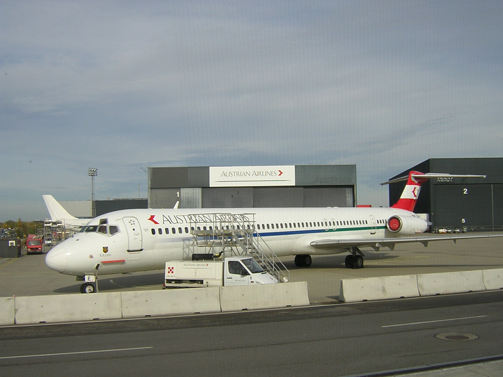 Eine der beiden MD 83 am Flughafen Wien. Ende Juni 2005 hat Austrian die letzte MD 83 weggegeben. - Oktober (?) 2004